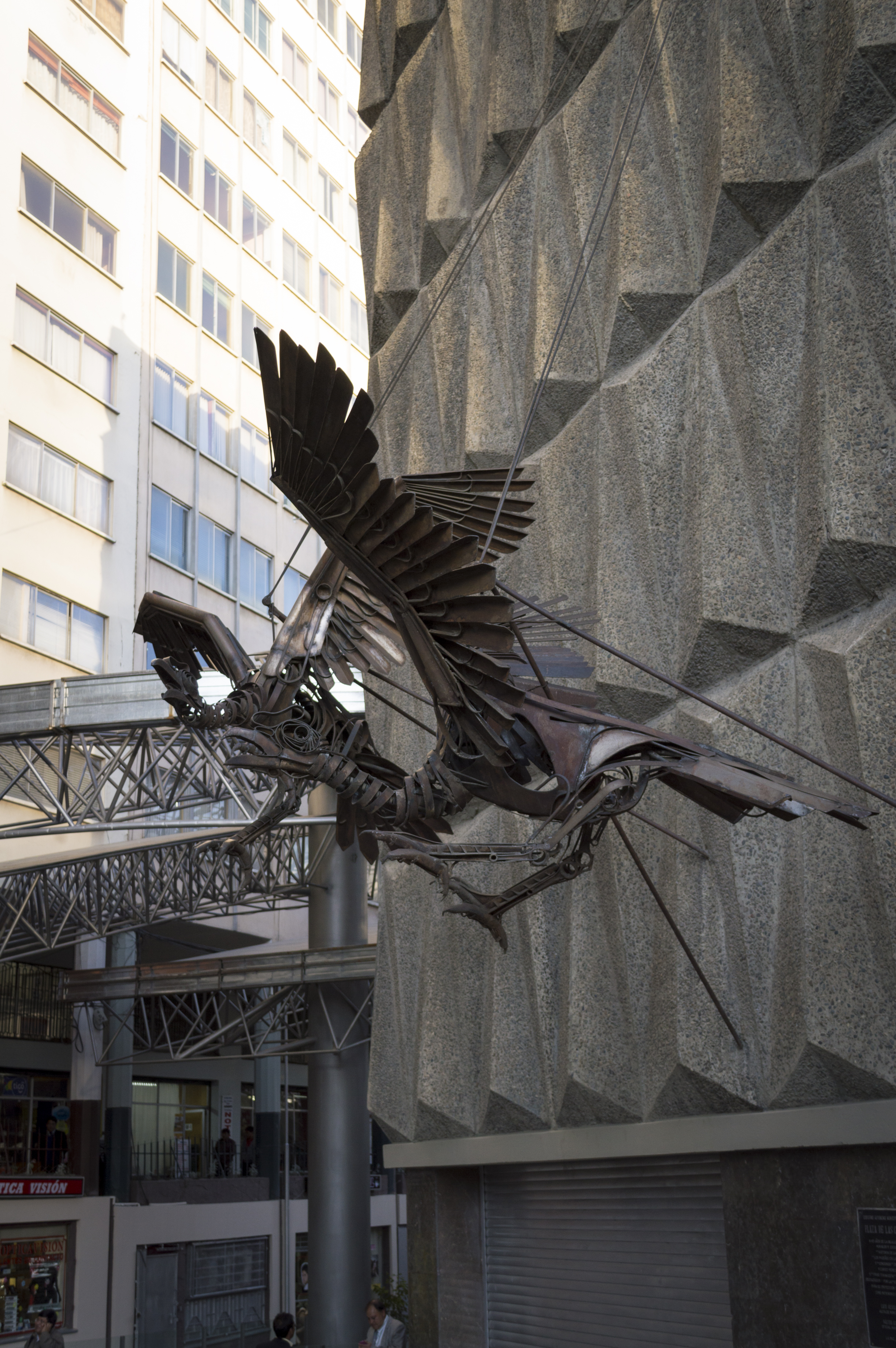 Cóndores Av. Montes, La Paz - Bolivia This medium shows the protected monument with the number L/00-214 in Bolivia.